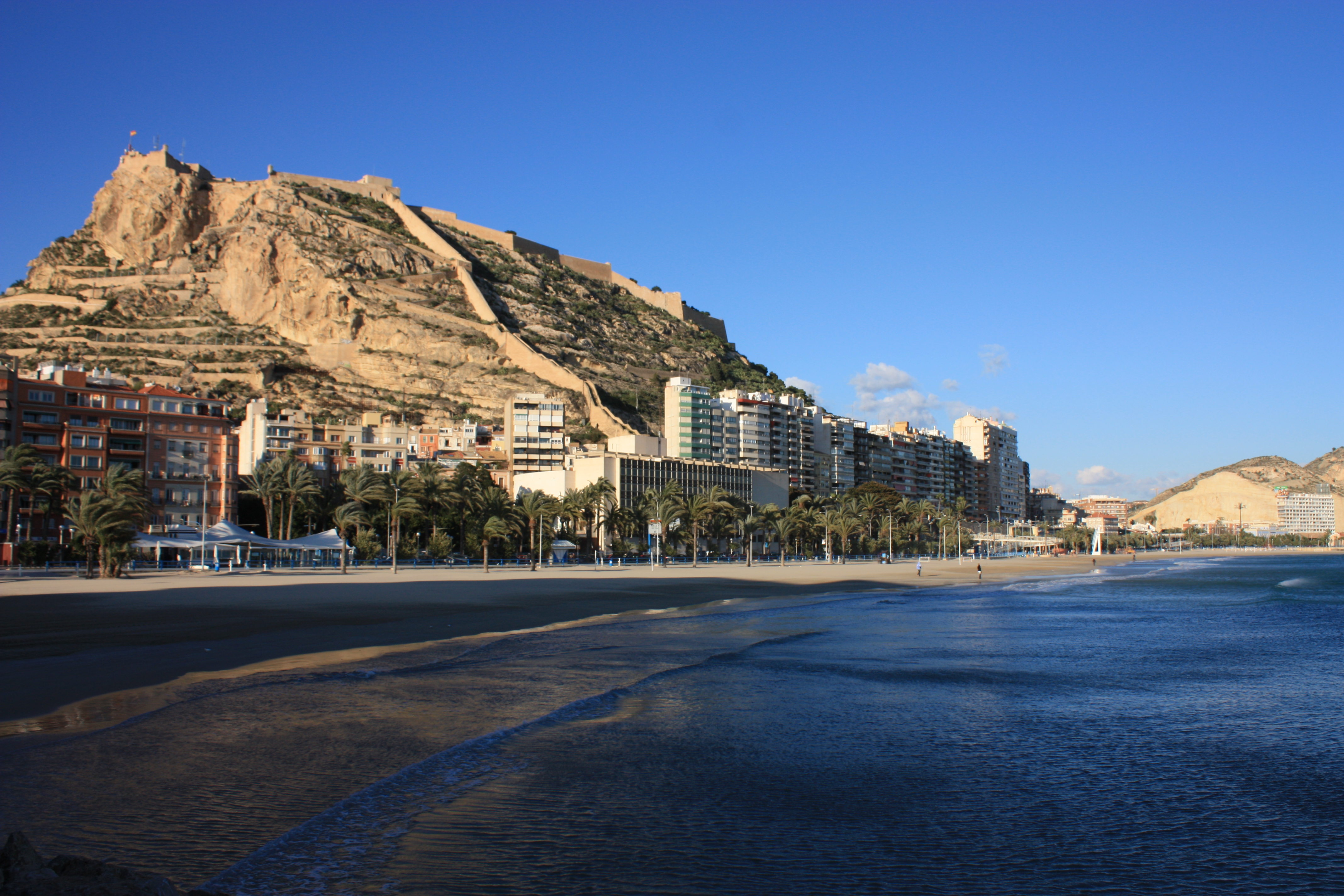 Castillo de Santa Bárbara, Alicante